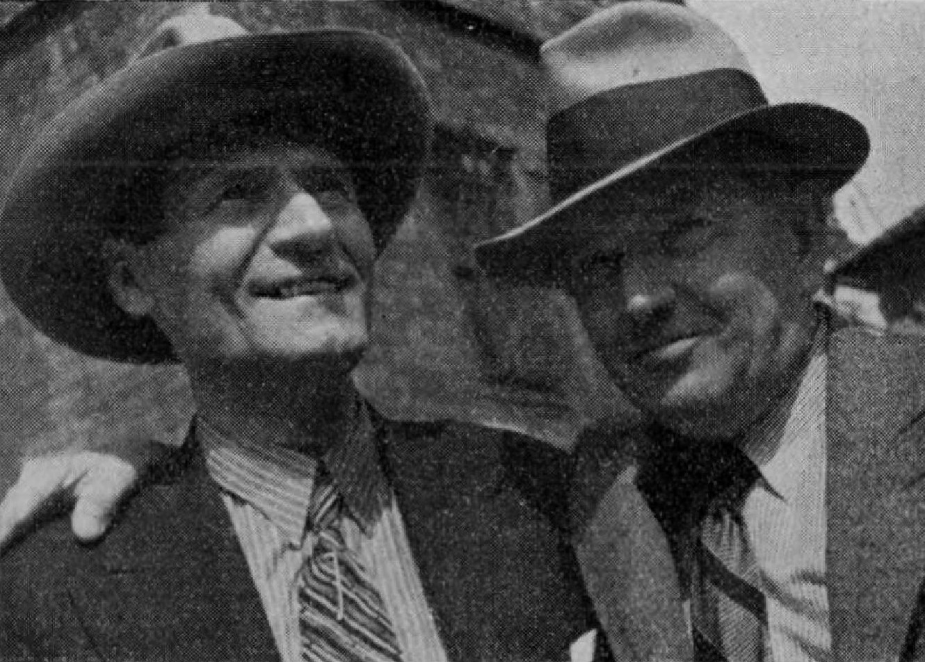 Ferry Seidl (1881-1939), český filmový režisér a herec